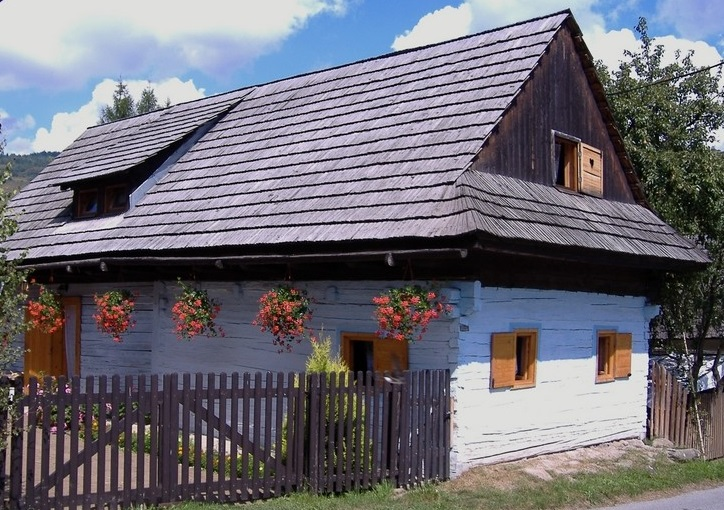 drevenica v rejdovej